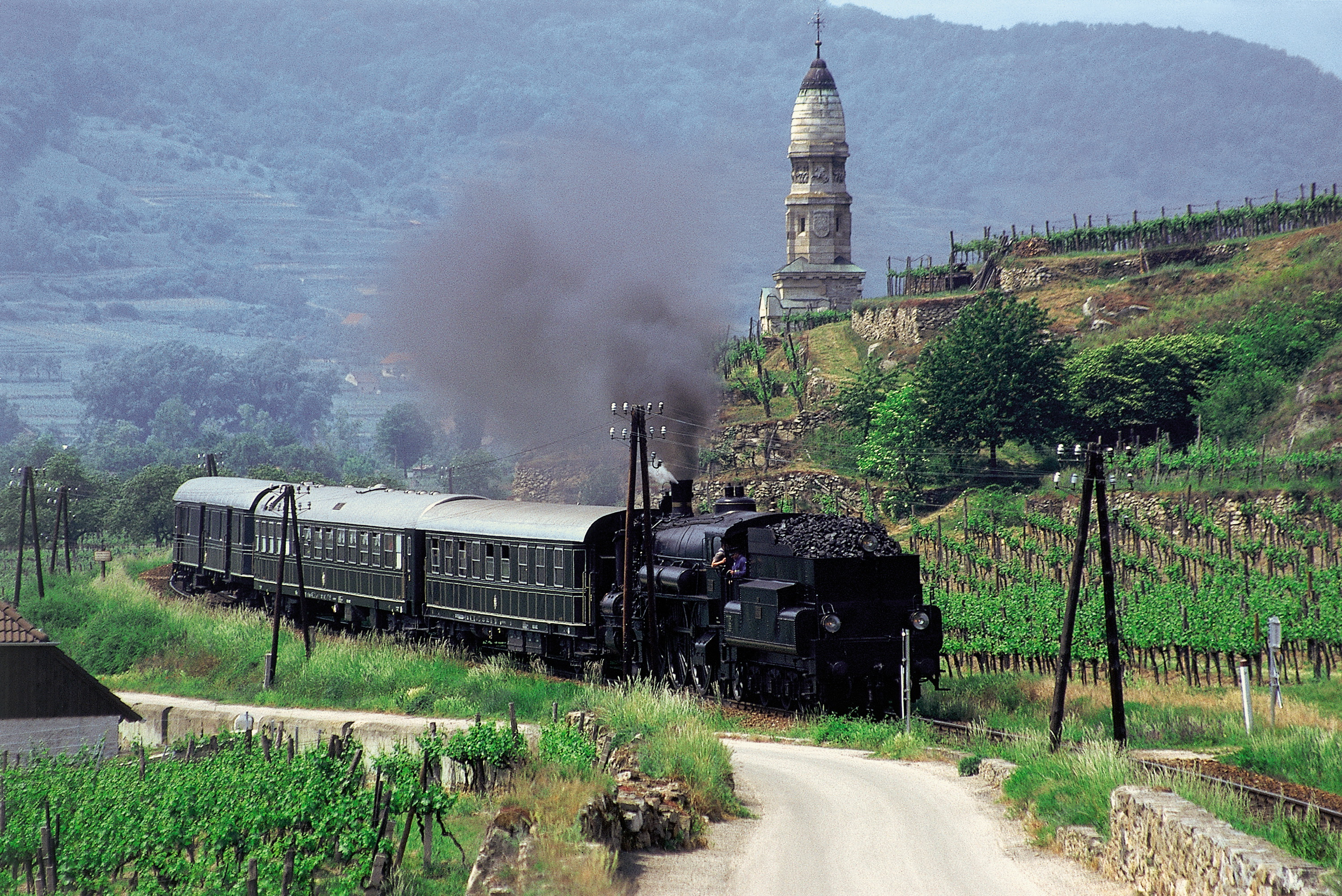 Majestic Imperator Train de Luxe fährt durch die Wachau.